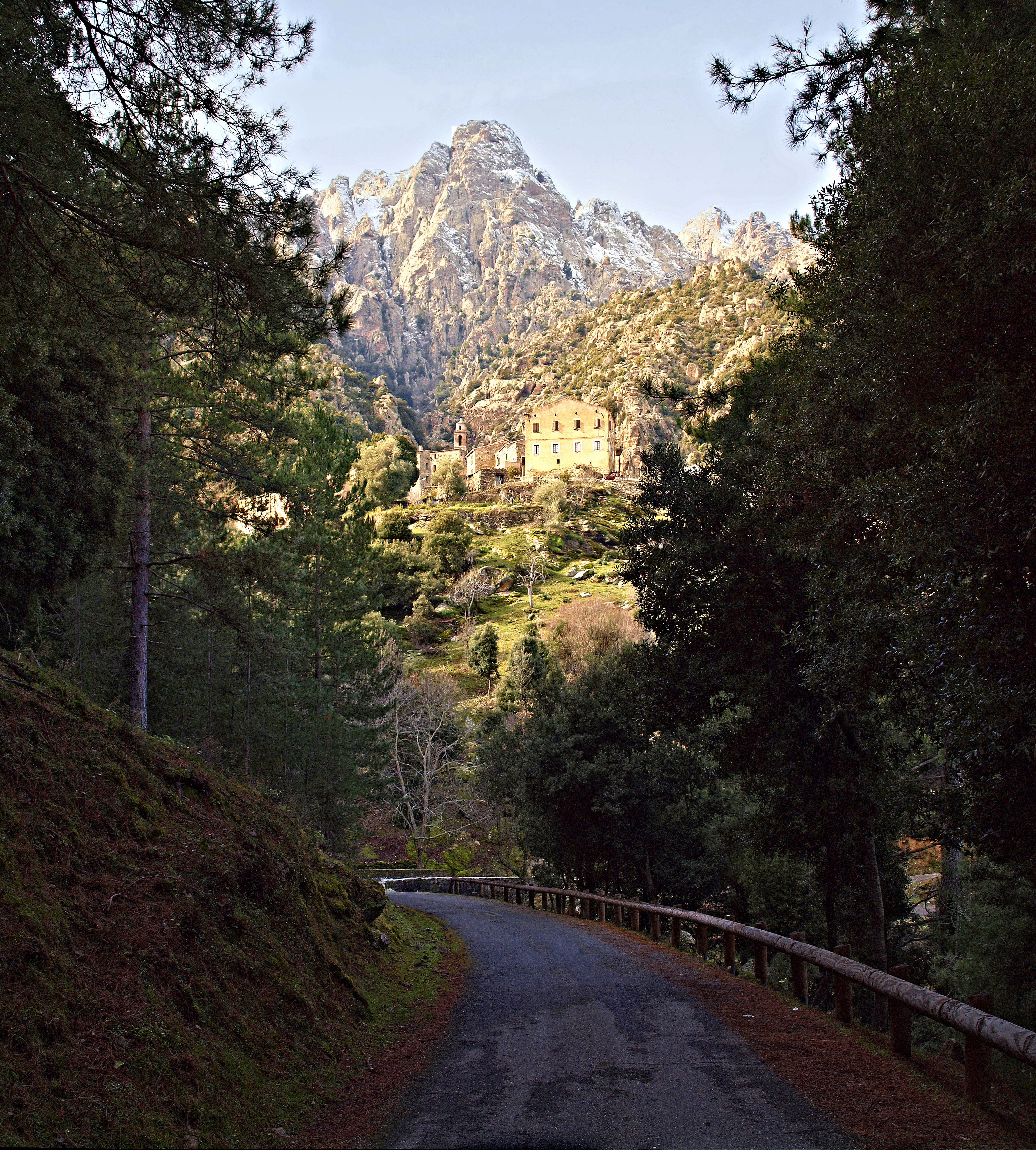 Popolasca (Corsica) - Le village et Punta Cavallare (1736m)